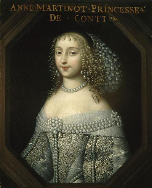 Porträt Anna Maria Martinozzis, verheiratete Fürstin von Conti